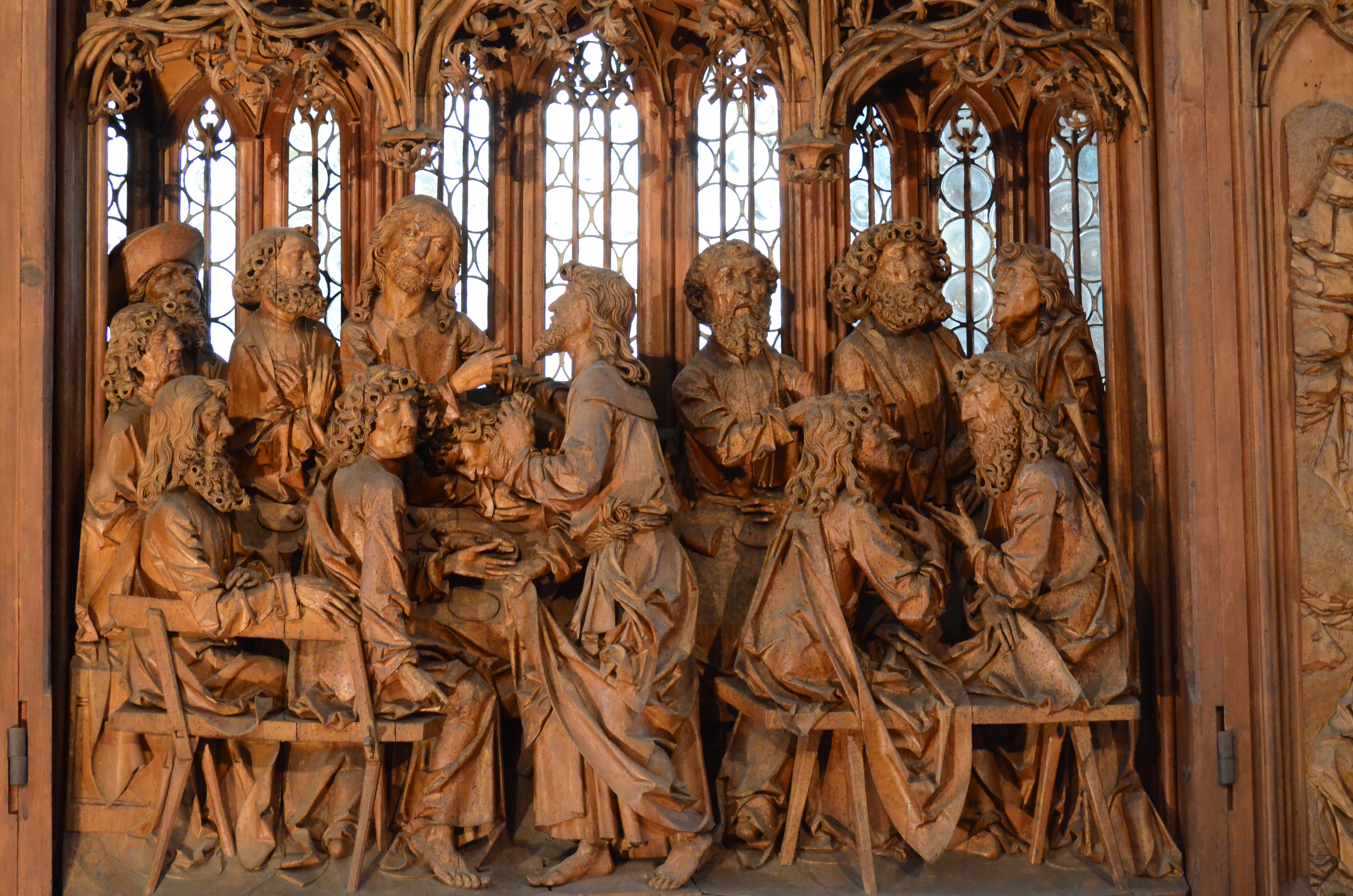 Heilig-Blut-Altar in St.Jakob in Rothenburg ob der Tauber